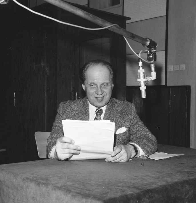 Zygmunt Kęstowicz, aktor. Fotografia portretowa pochodząca z archiwum Grażyny Rutowskiej.